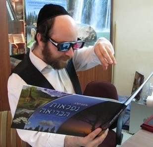 ספר התלת מימד "נפלאות הבריאה"